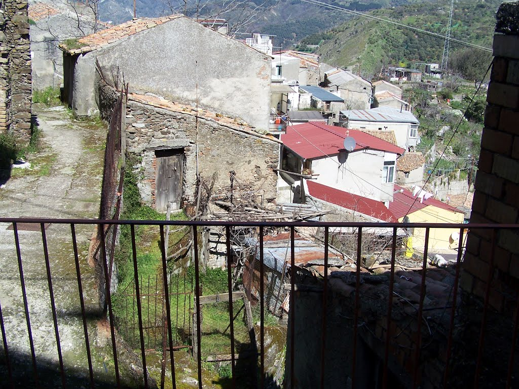 San Lorenzo, luogo in cui presumibilmente nacque San Gerasimo